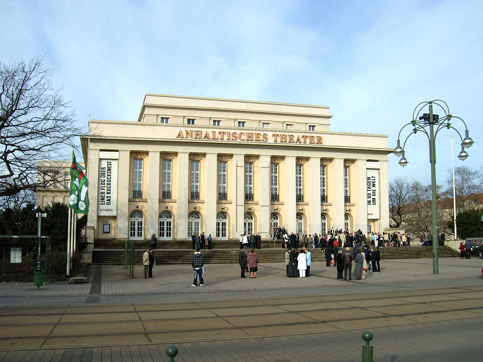 Dessau,Anhaltisches Theater